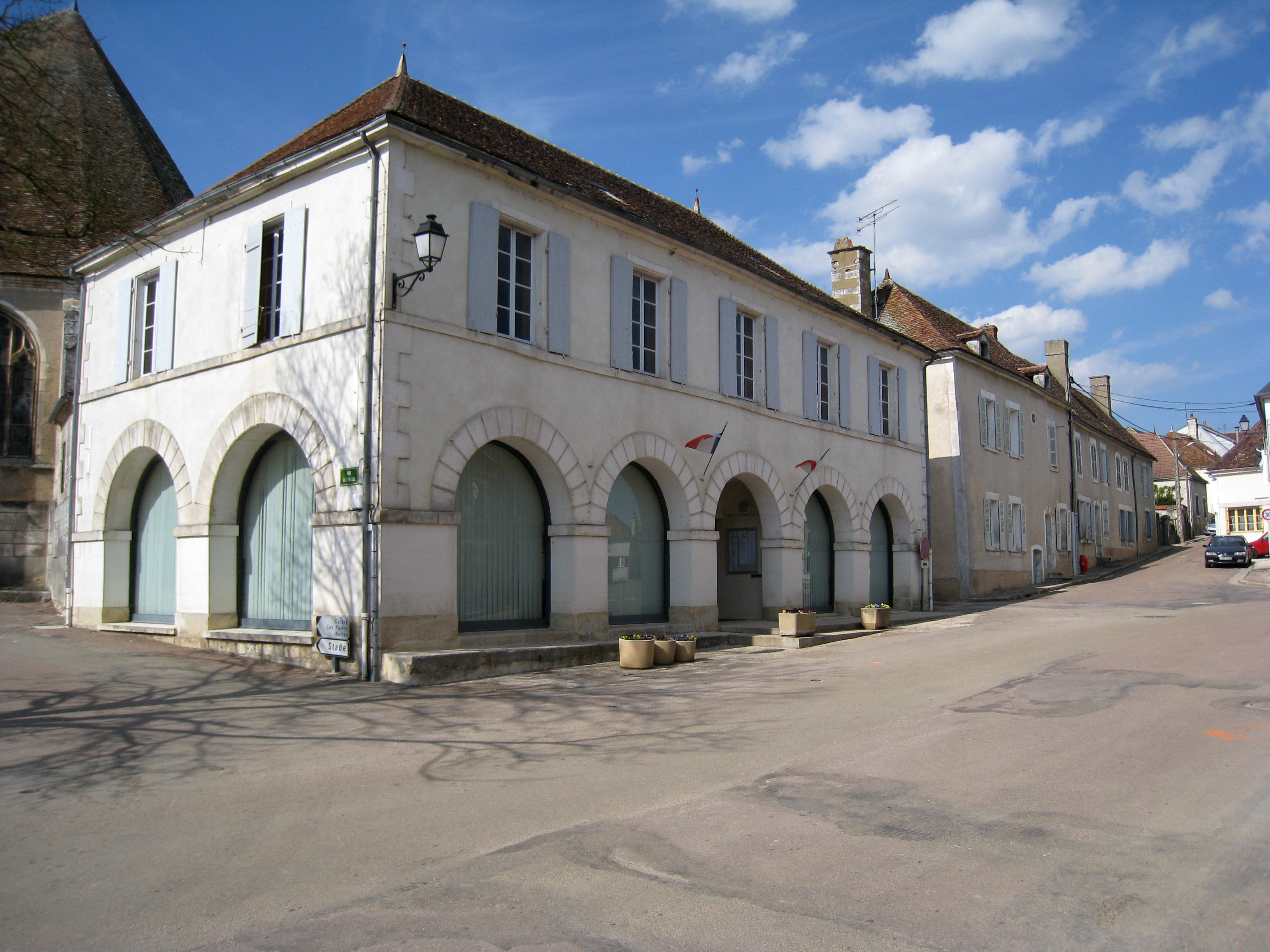 Mairie d'Ouanne, dans le département de l'Yonne.